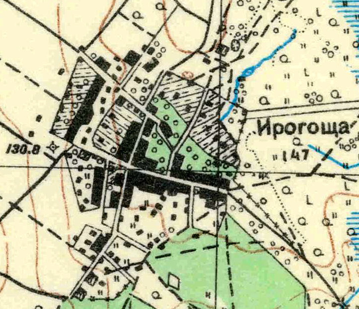 Топографическая карта Ленинградской области, квадрат О-35-11-В-в (Копорье), деревня Ирогощи